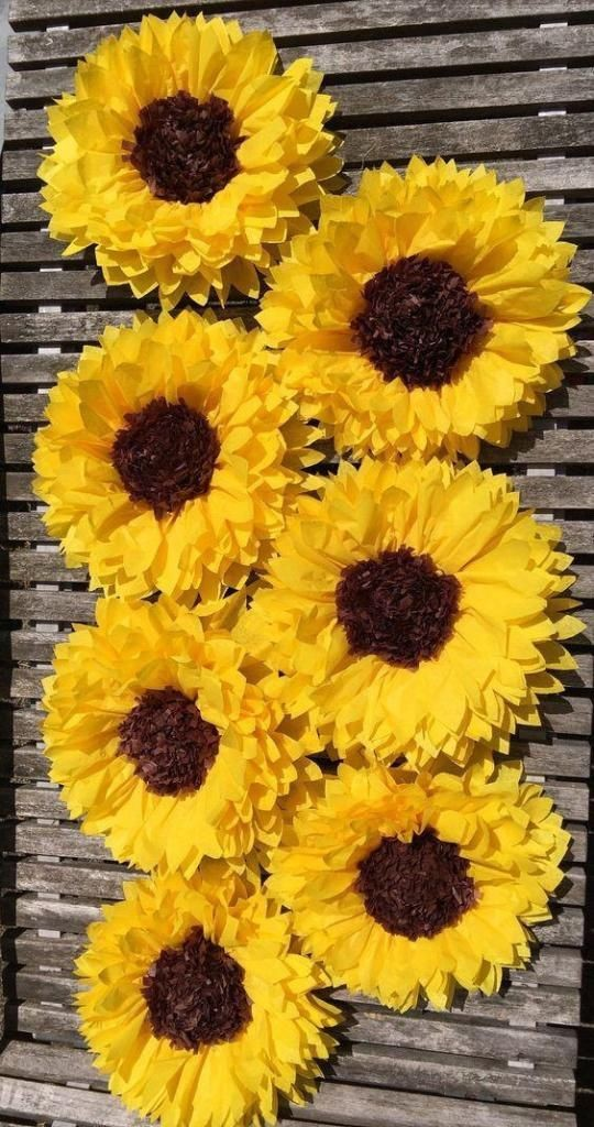 Manualidad en papel crepé hecha para un cuadro